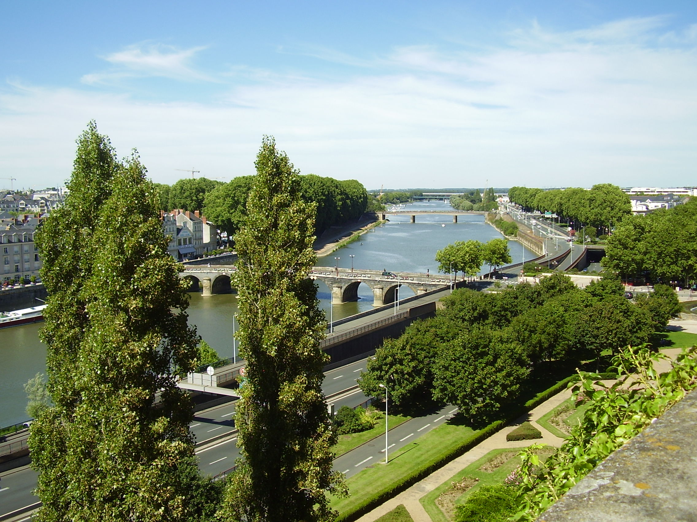 Angers, France